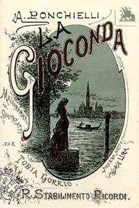 Copertina del primo libretto della Gioconda (libretto del 1876)